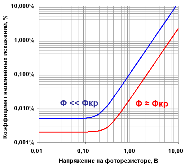 Типичная зависимость коэффициента нелинейных искажений кадмиевого фоторезистора от приложенного к нему переменного напряжения (по материалам PerkinElmer, США). Синяя линия - Кни для малых (ненулевых) уровней освещённостей (высокое сопротивление фоторезистора) Красная линия - для высокой освещённости (малые сопротивления фоторезистора)